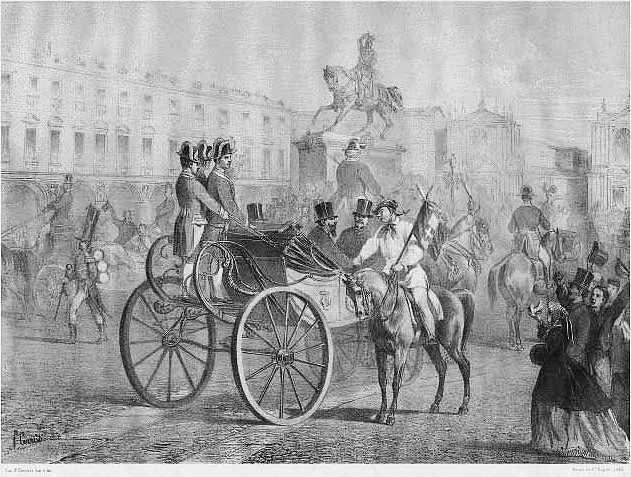 Episodio del carnevale di Torino del 26 febbraio 1865